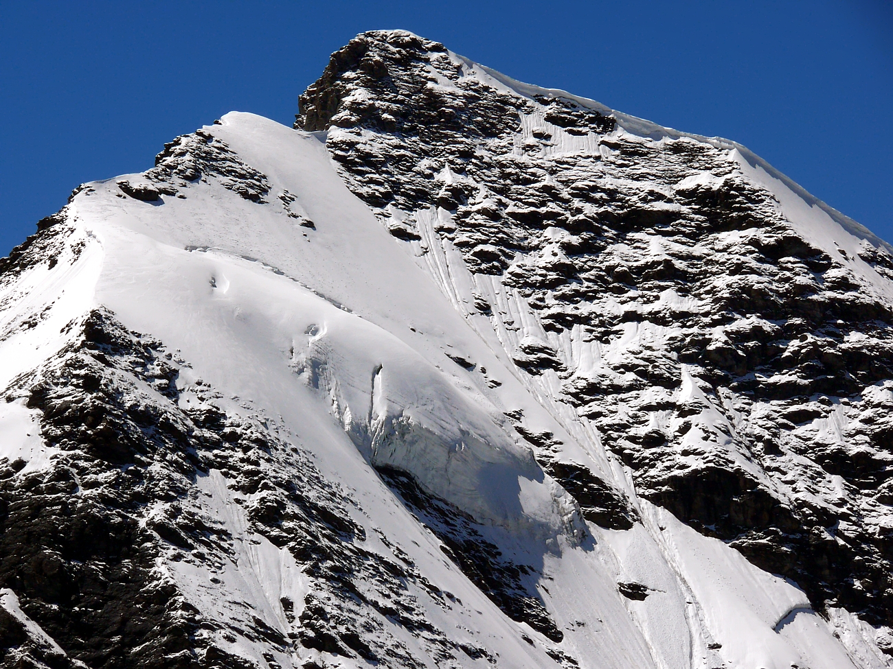 D:\WIKI\Sassiere 002.jpg - Alpi Graie - Italy